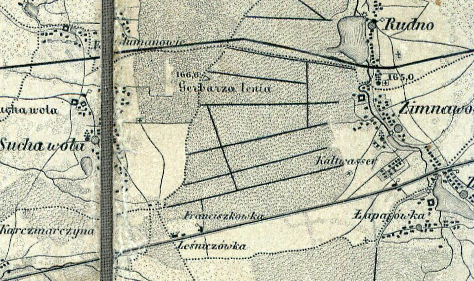 Місцевість, в якій тепер розміщене с. Конопниця, на австро-угорській карті (1855 рік)